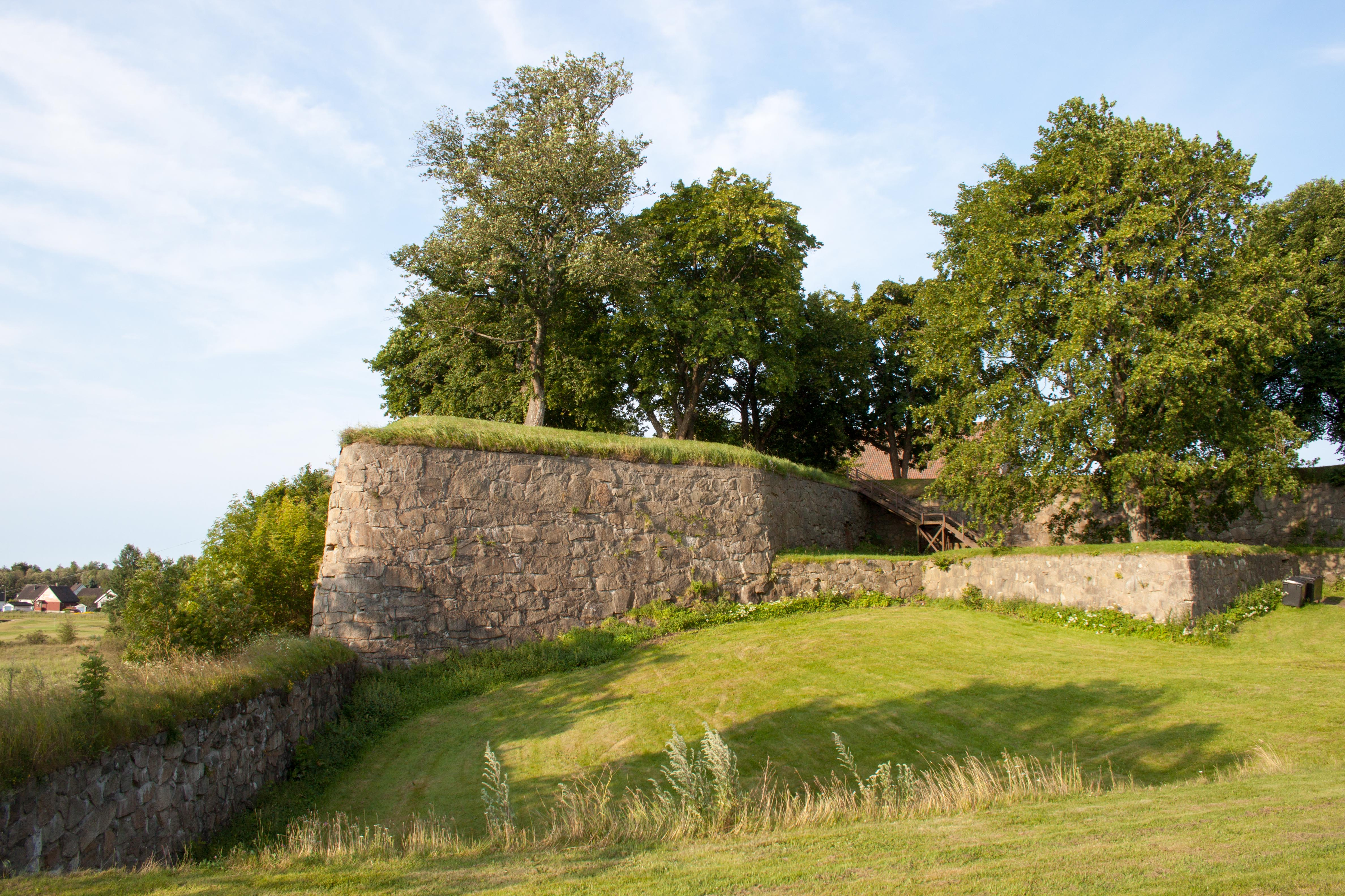 Kongsten Fort